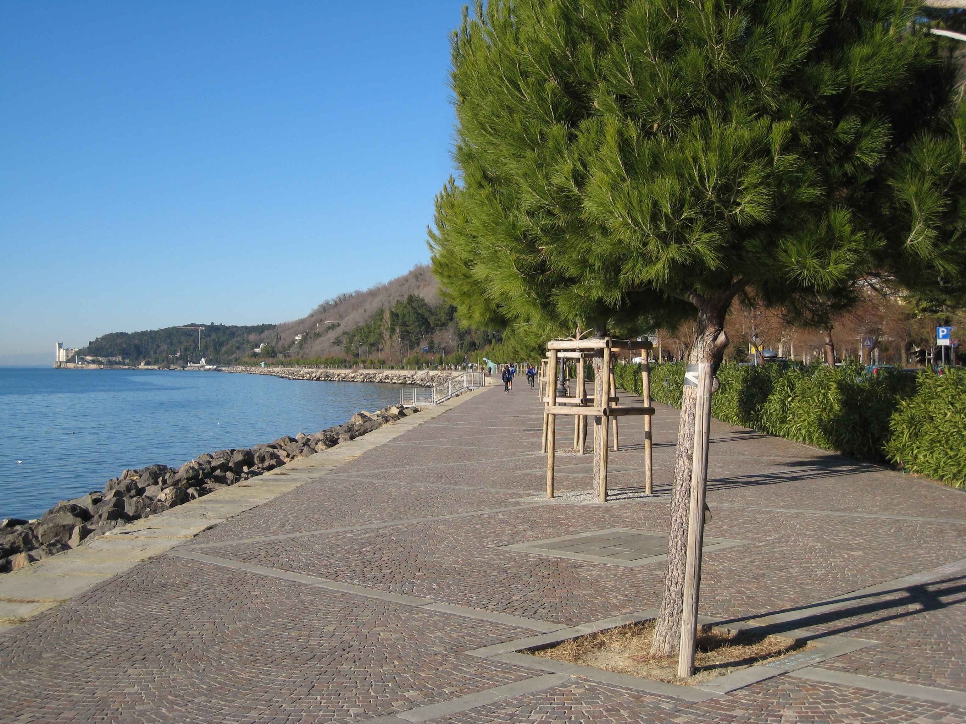 Trieste - Barcola - Il lungomare. Dicembre 2007